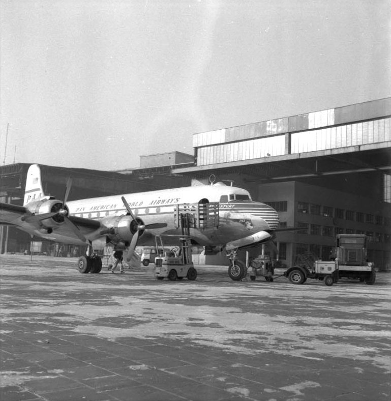 Stadtaufnahmen Berlin Flughafen Tempelhof